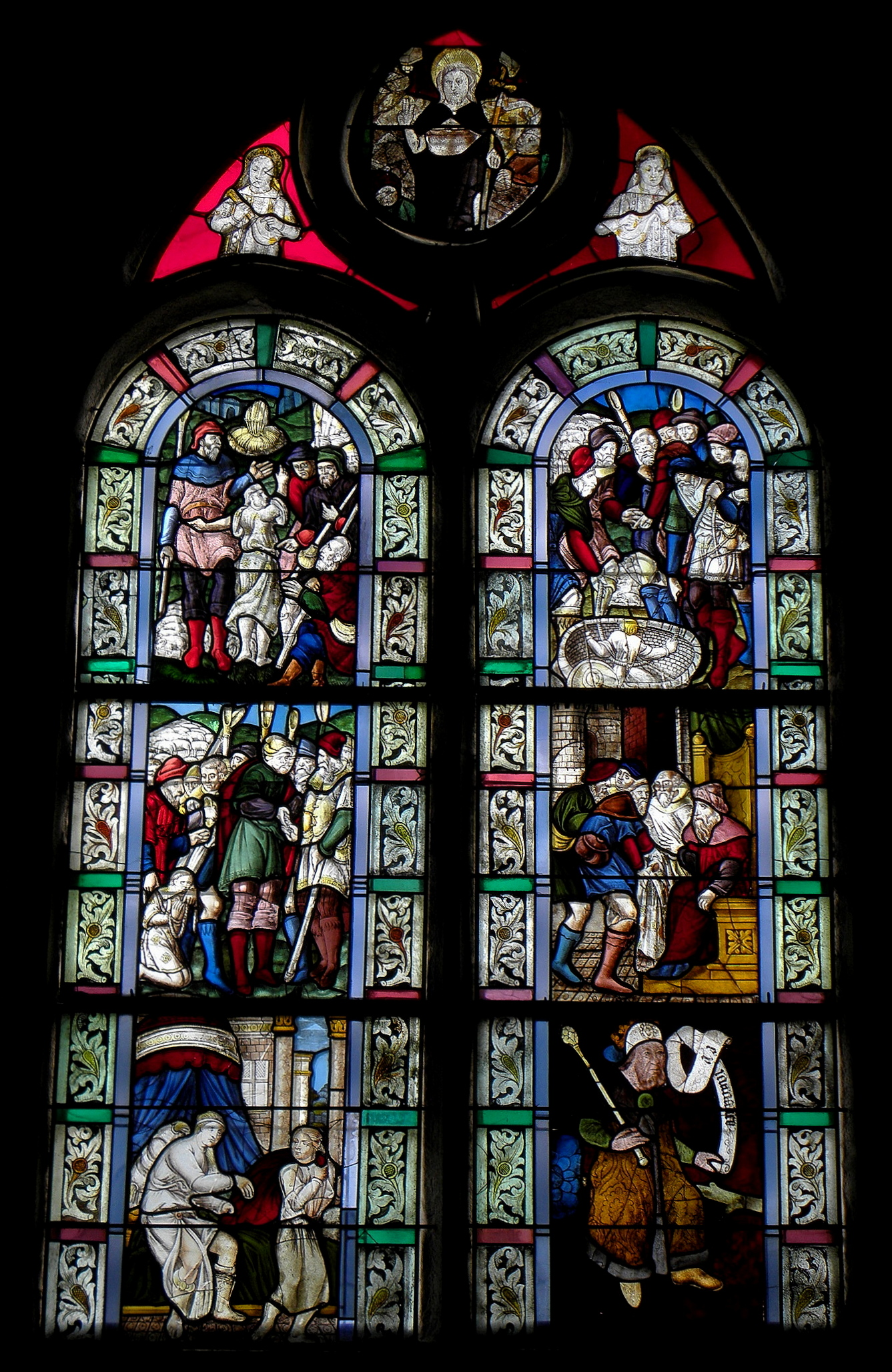 Baie 11 de la chapelle Notre-Dame de Kergoat en Quéménéven (29).